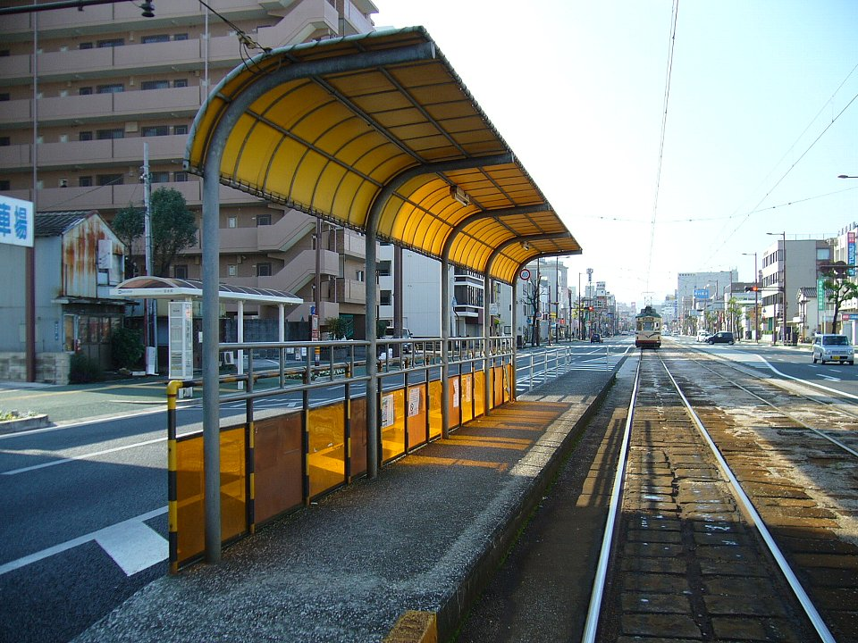 後免線ja:宝永町停留場